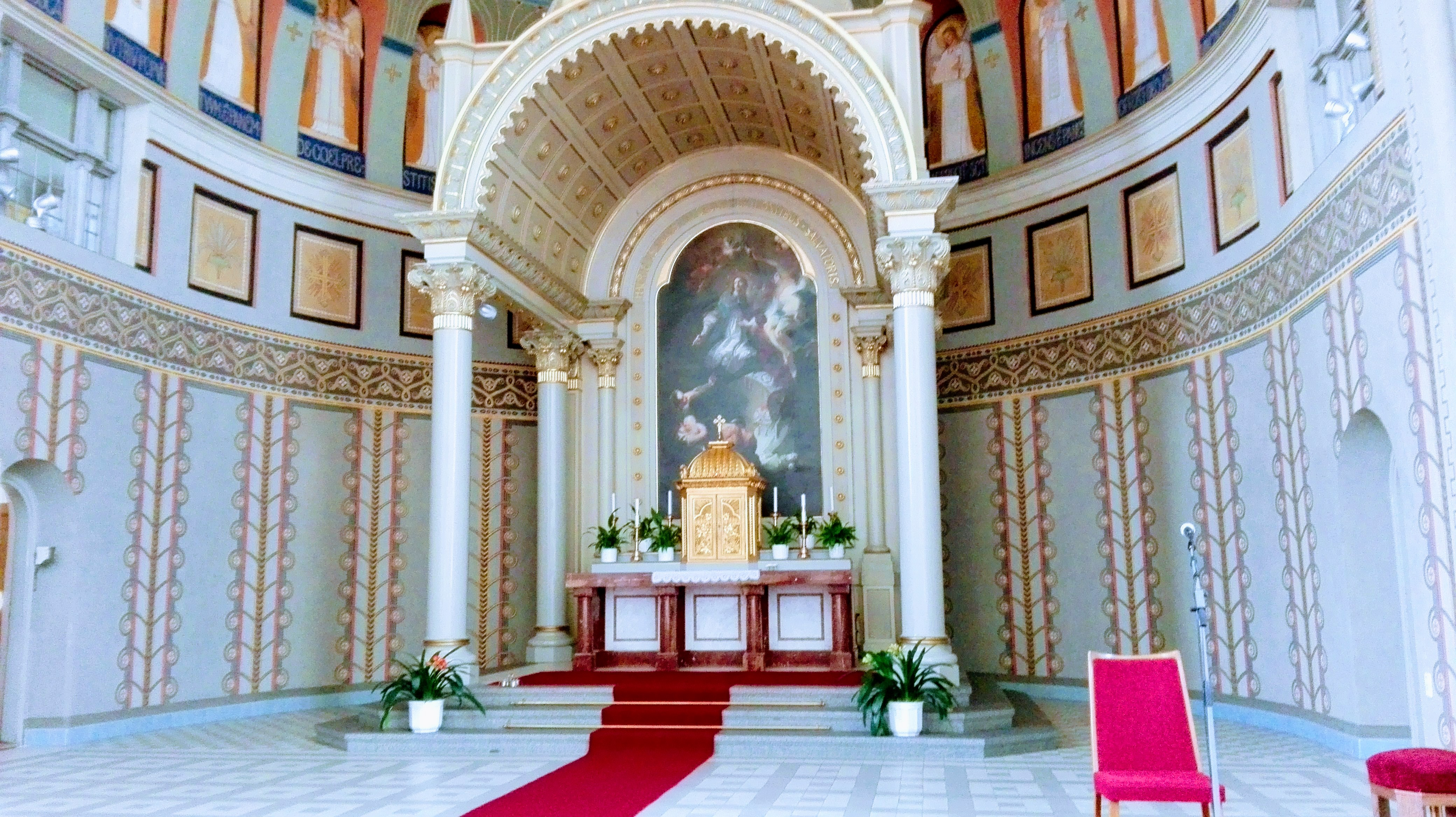 Hlavní oltář